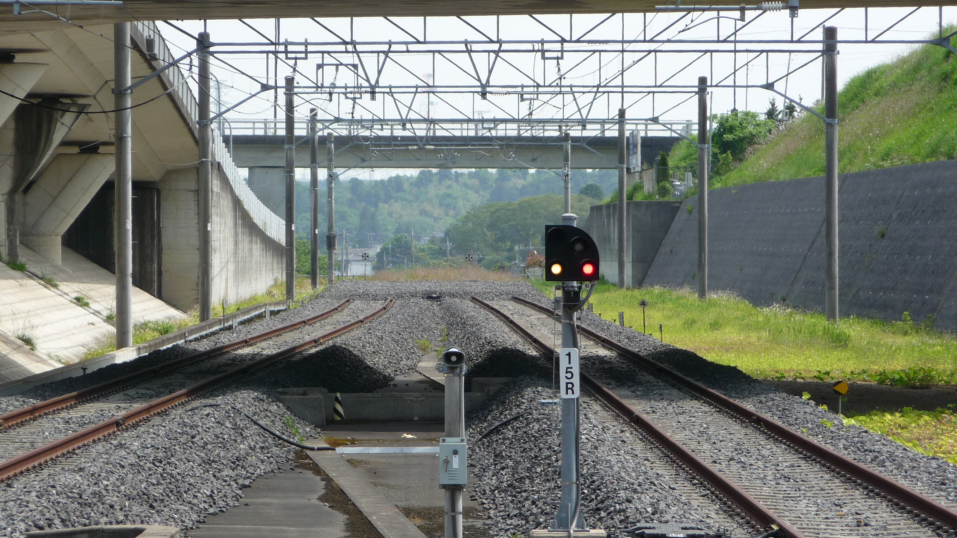 ホームから望む京成千原線ちはら台駅終端